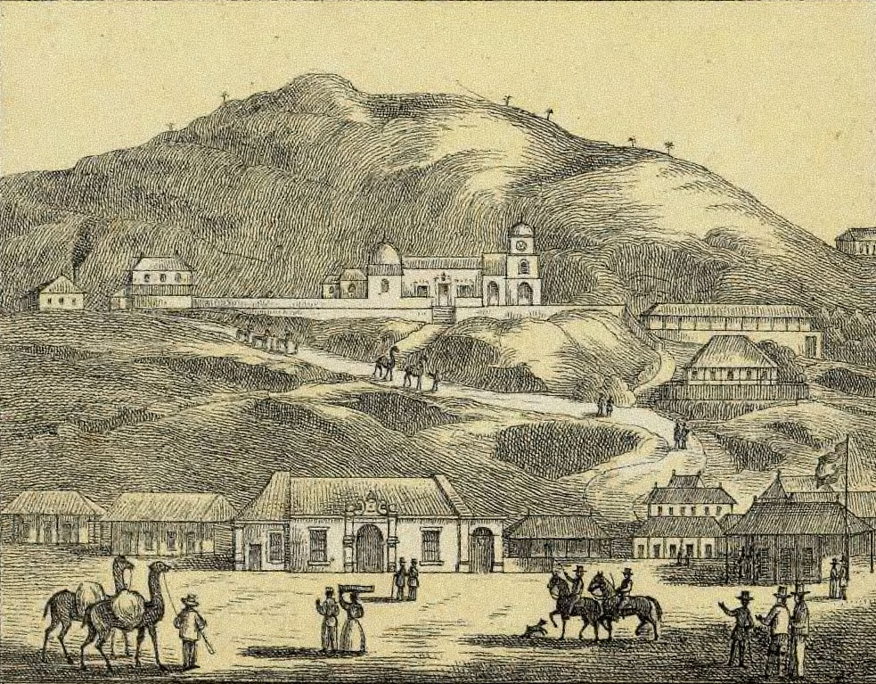 Santuario de El Cobre, Santiago de Cuba